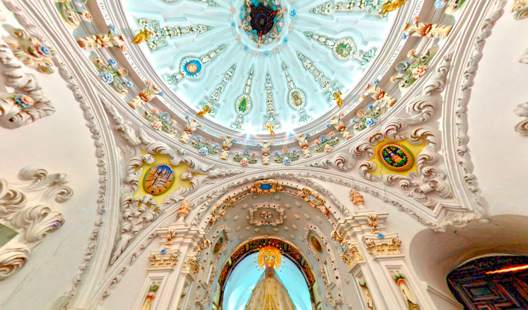 Camarín de la Virgen, en el interior de la iglesia de Santa María en Alcázar de San Juan. Ogra de estilo barroco-Rococó, muy del estilo de otros camarines andaluces. Cerámica de Talavera de la Reina. Yeserías con motivos vegetales